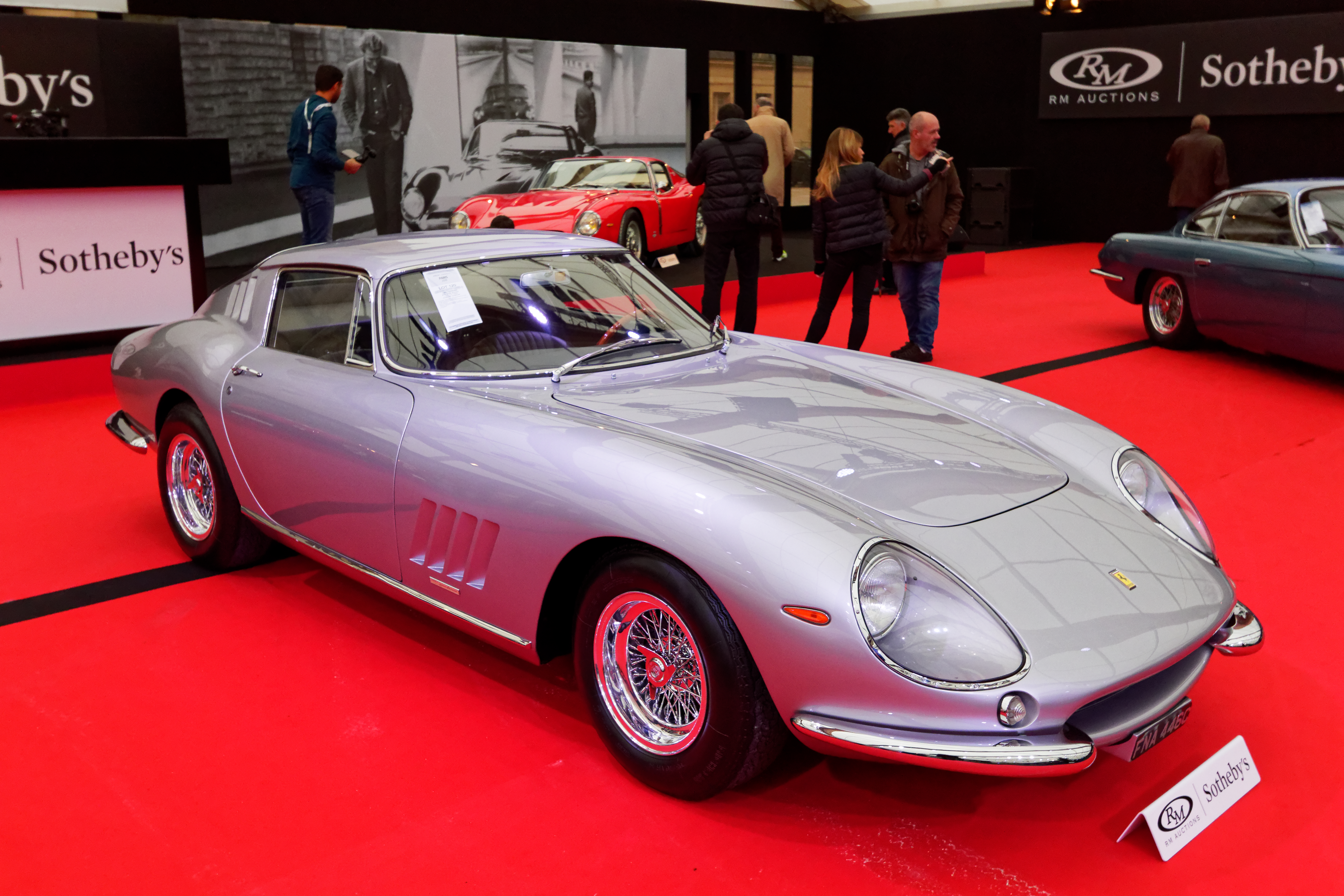 Un véhicule exposé lors de la vente RM Sotheby’s 2018 aux Invalides à Paris.